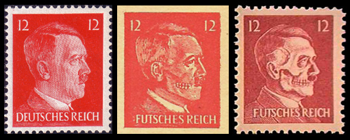 Почтовая марка Германии, Адольф Гитлер, и две американские марки-пародии "Гитлер-череп", 1942